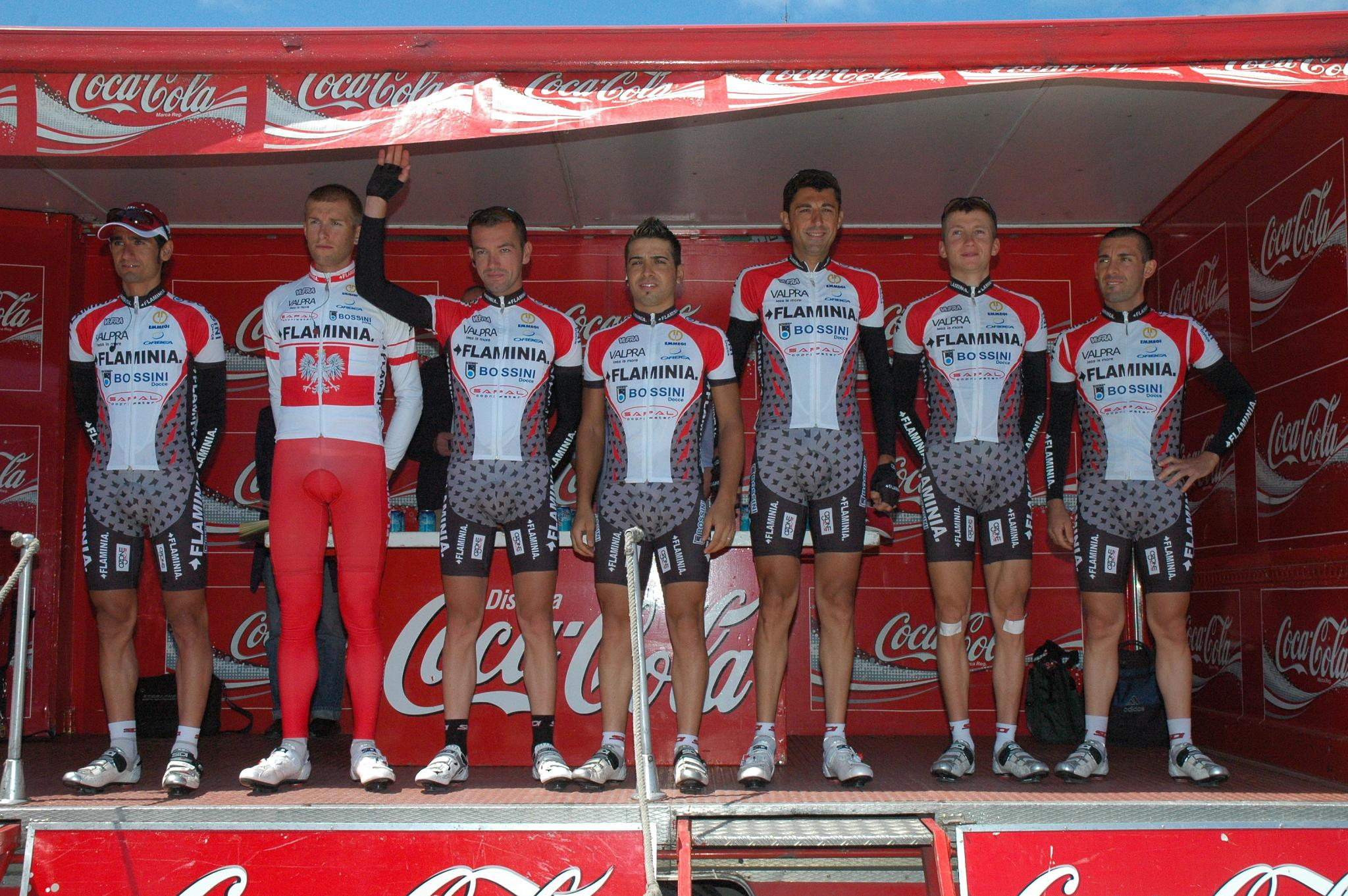 Ceramica Flaminia-Bossini Docce, Euskal Bizikleta 2008